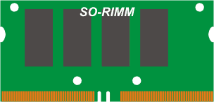 S0-RIMM-Ram Modul M1:1